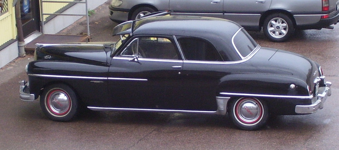 Dodge Coronet Coupé -50. Picture taken in Uddevalla, Sweden.